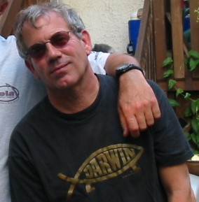 Robert Curtis Lewis